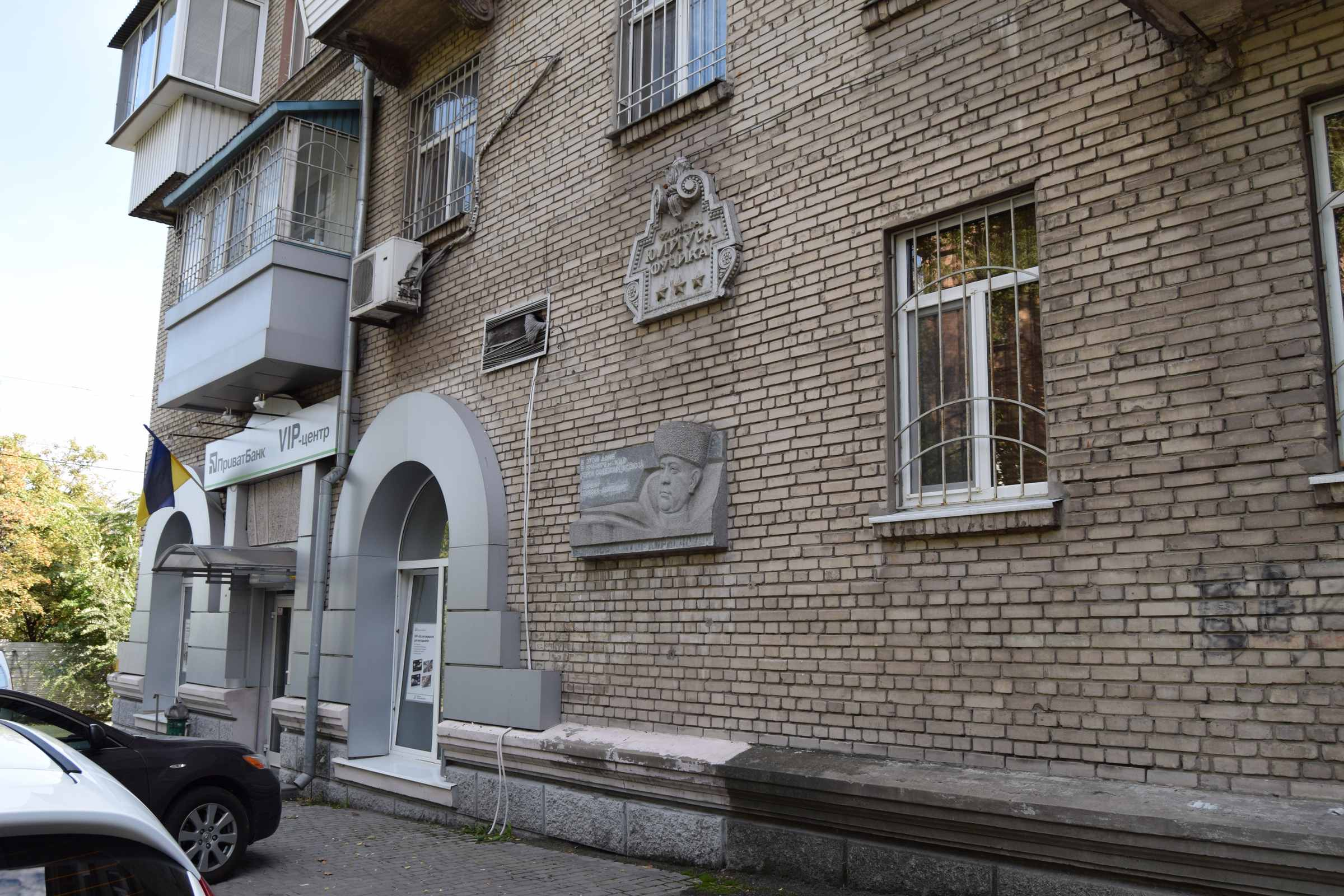 Мем. дошка Будинок, у якому мешкав Герой Радянського Союзу, генерал-лейтенант, командир кавалерійського корпусу Баранов В.К. (1901-1970) (1956-1970 рр.), Дніпро, вул. І. Акінфієва, 28